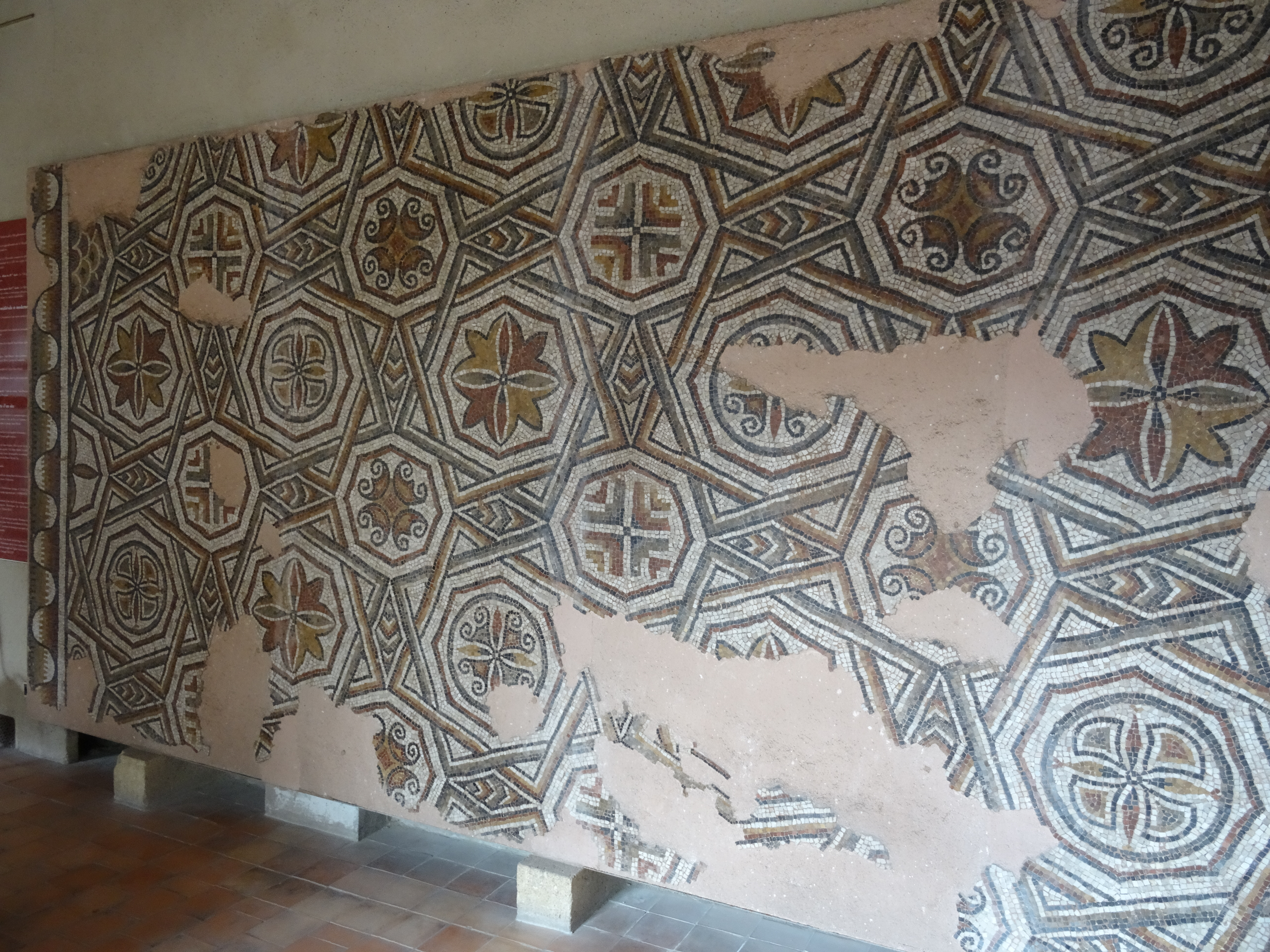 Mosaïque de la villa Saint-Michel de Lescar